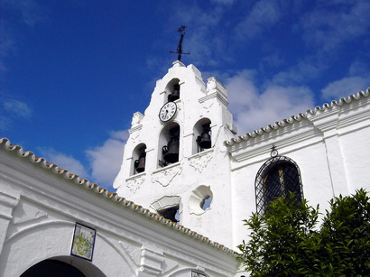 Santuario de la Cinta de Huelva